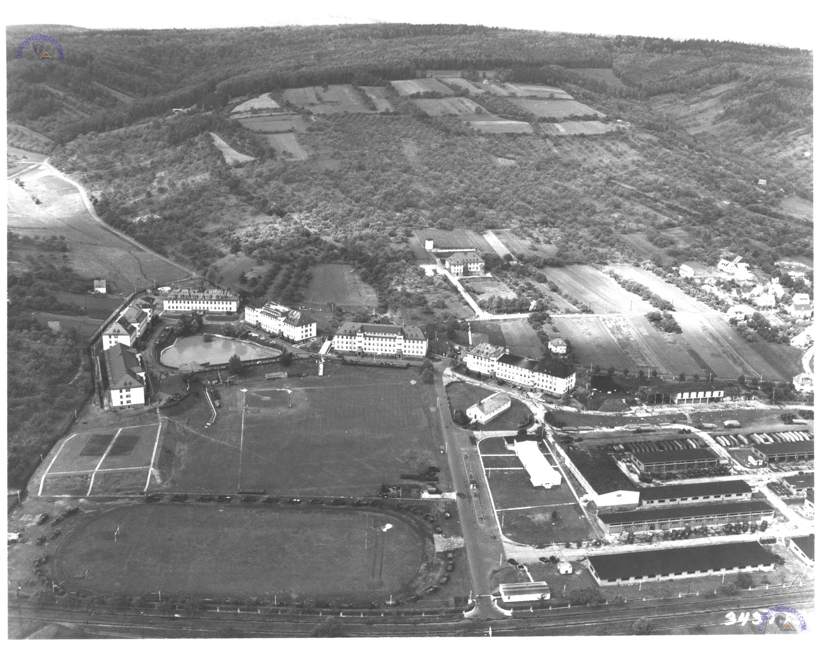 Panzerjäger-Kaserne later Coleman Barracks in Gelnhausen